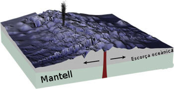 Descripció de la dorsal oceànica